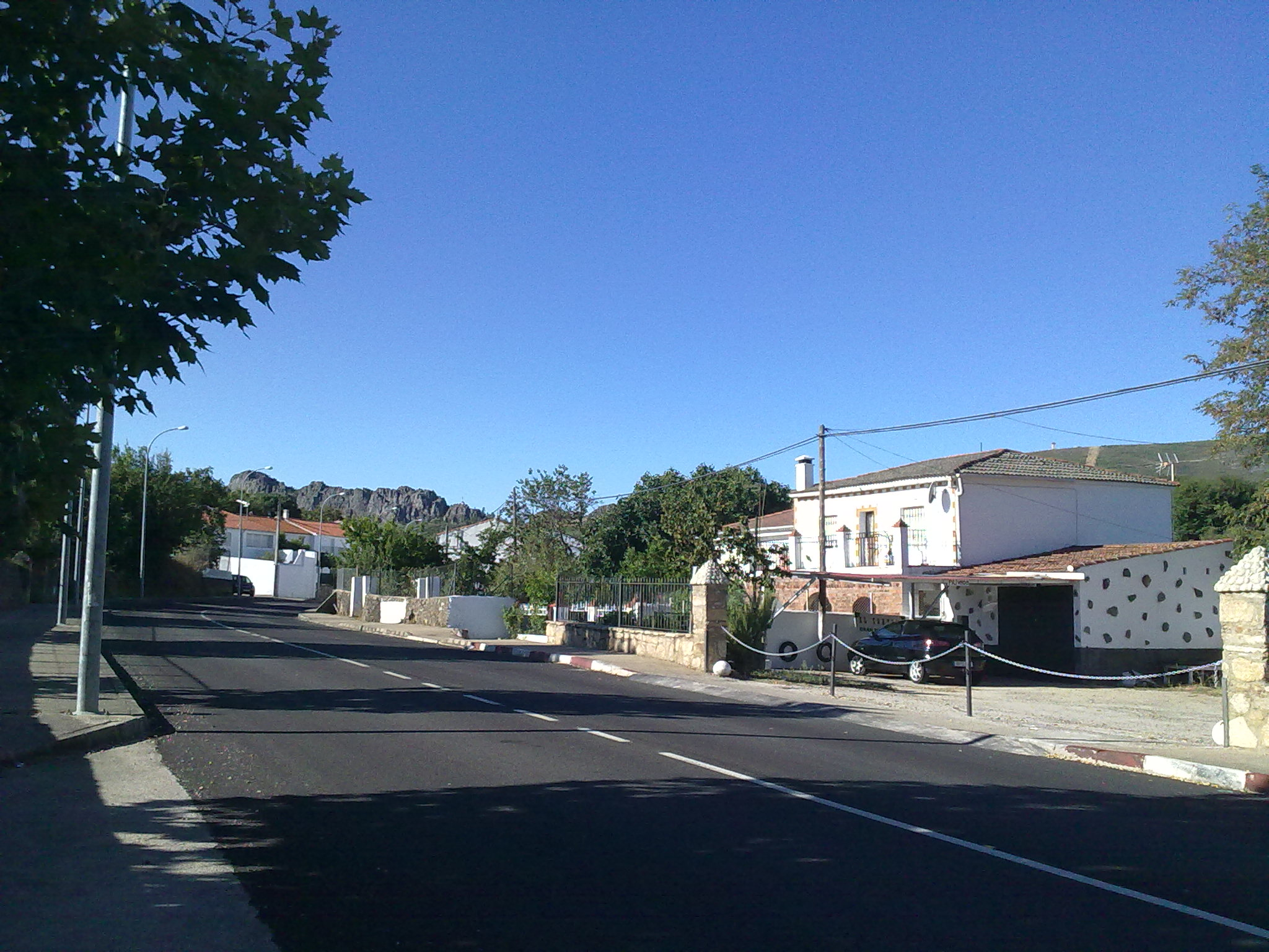 Carretera en Huertas de Cansa, municipio de Valencia de Alcántara, provincia de Cáceres, España